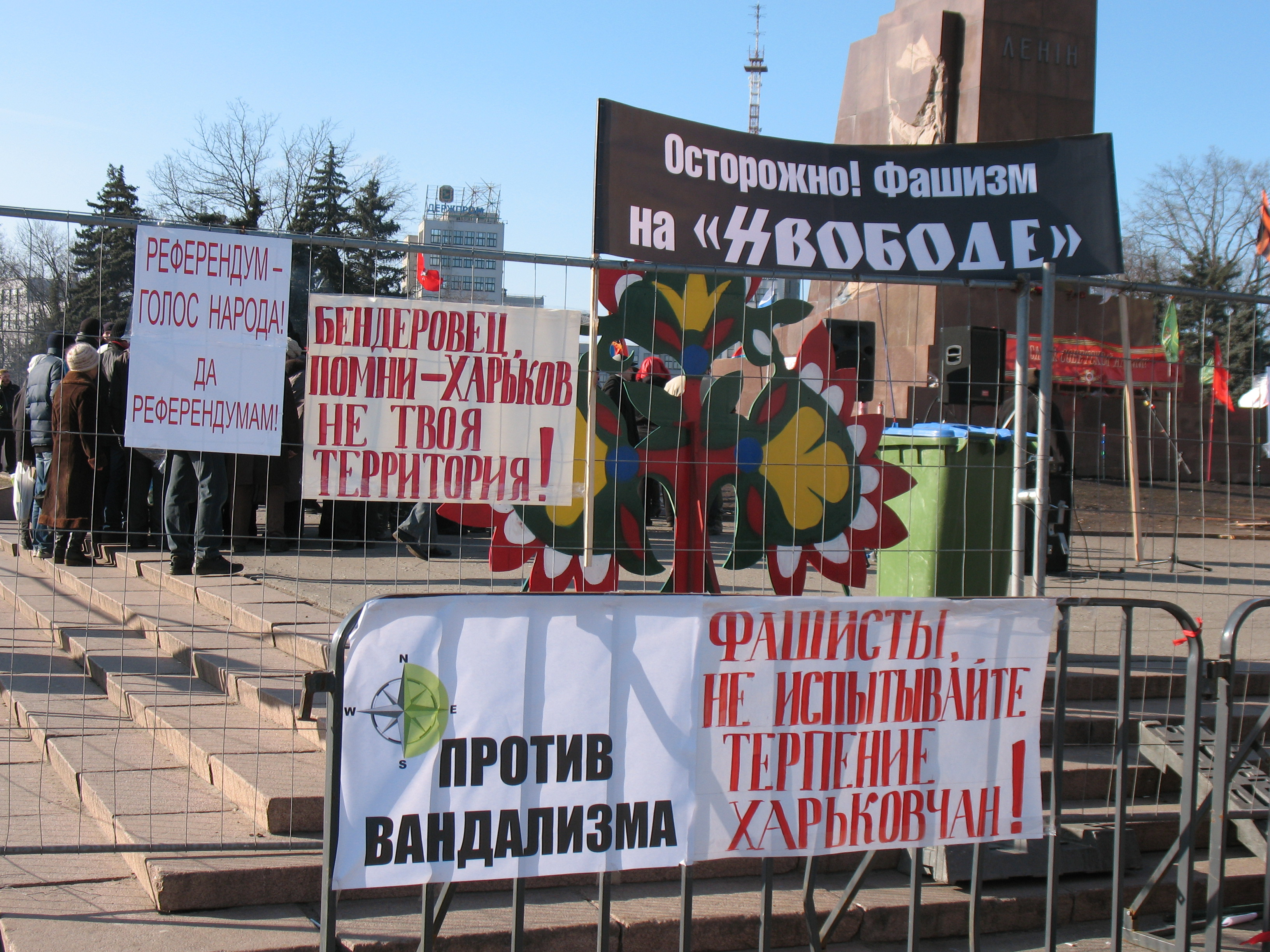 Харьков, 25 февраля. Оборона памятника Ленину горожанами от приехавших в город 22 февраля боевиков "Правого сектора", которые пытаются его снести. Второй ряд оцепления. "Бендеровец, помни, Харьков - не твоя территория!"